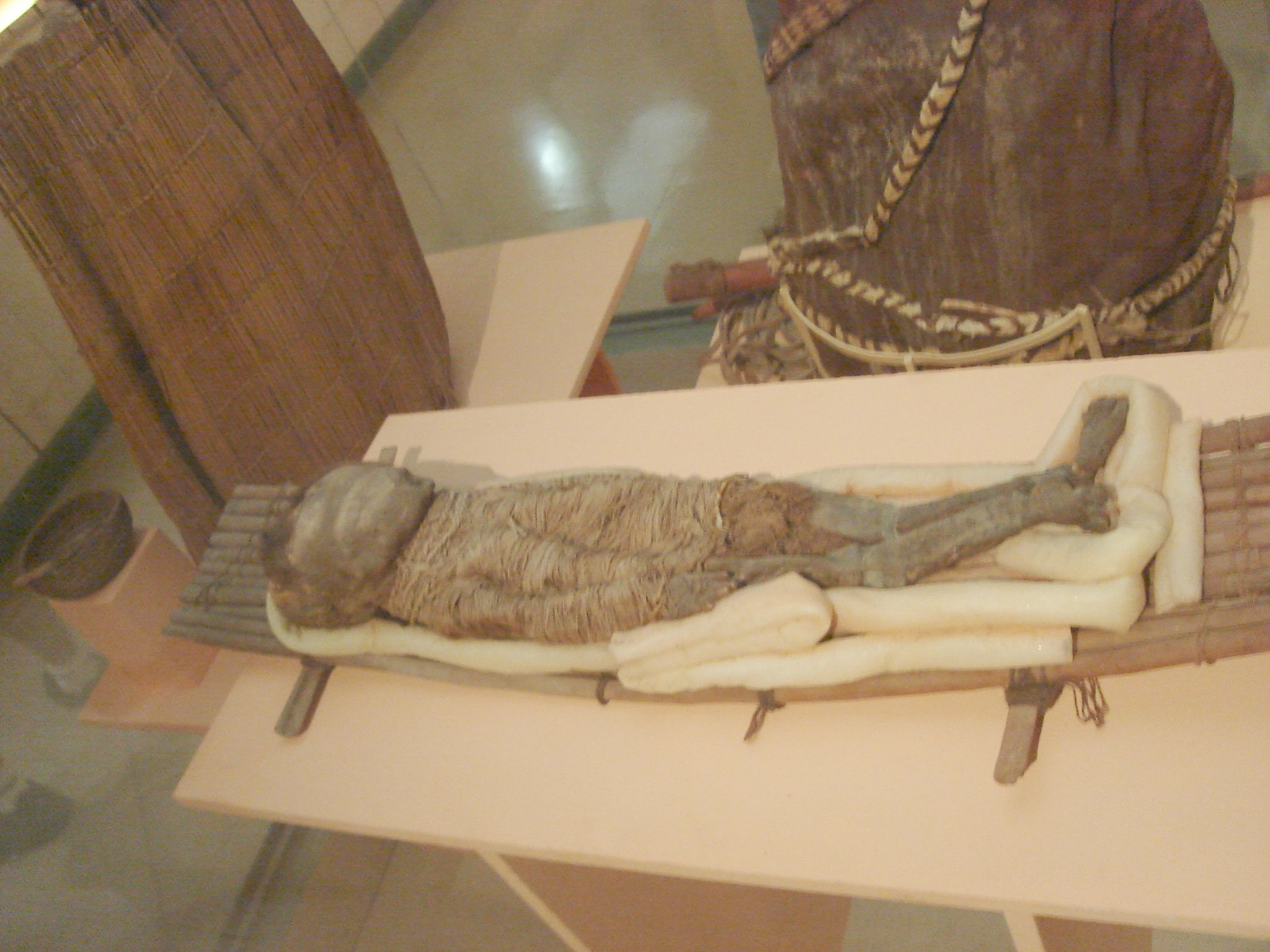 Foto tirada por mim, em Arica.